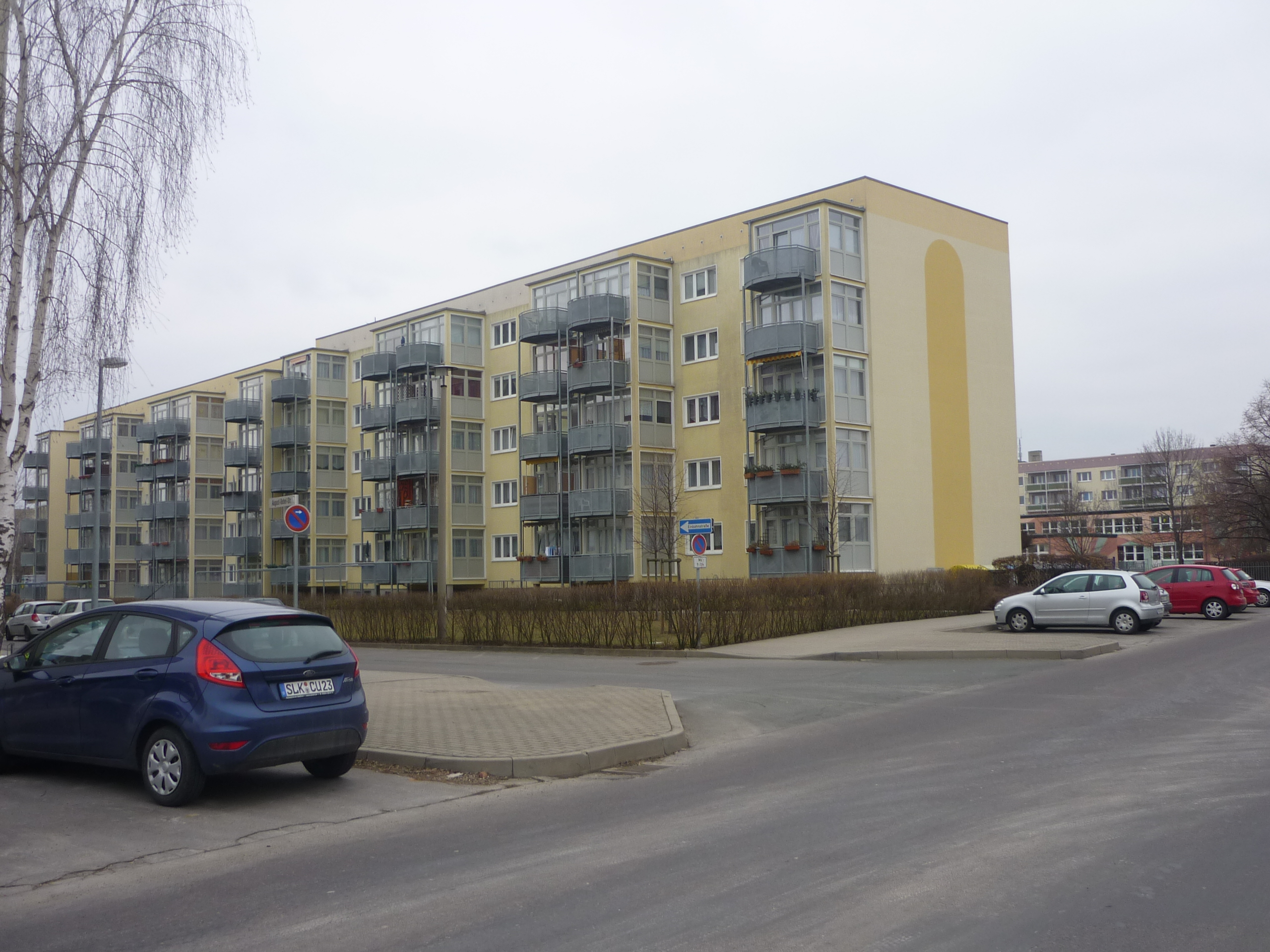 WOBLST